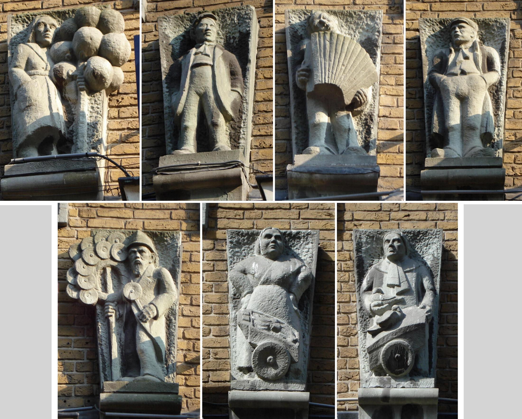 Rotterdam, Meent, Minervahuis. Gevelstenen door Johan van Berkel. Rotterdam/The Netherlands. Rotterdam/The Netherlands.